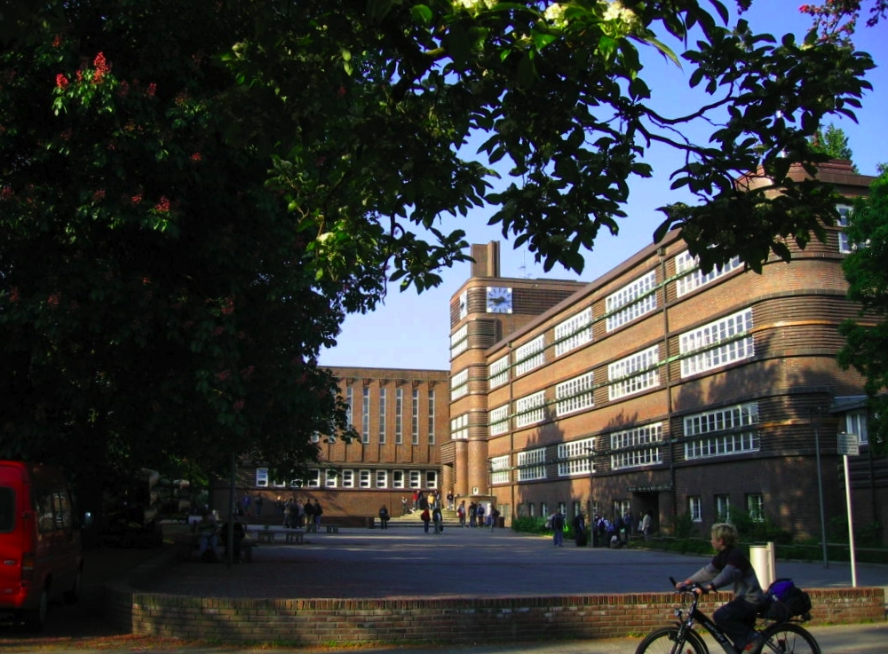 Freiherr-vom-Stein-Gymnasium, Lünen (Deutschland), Hauptgebäude